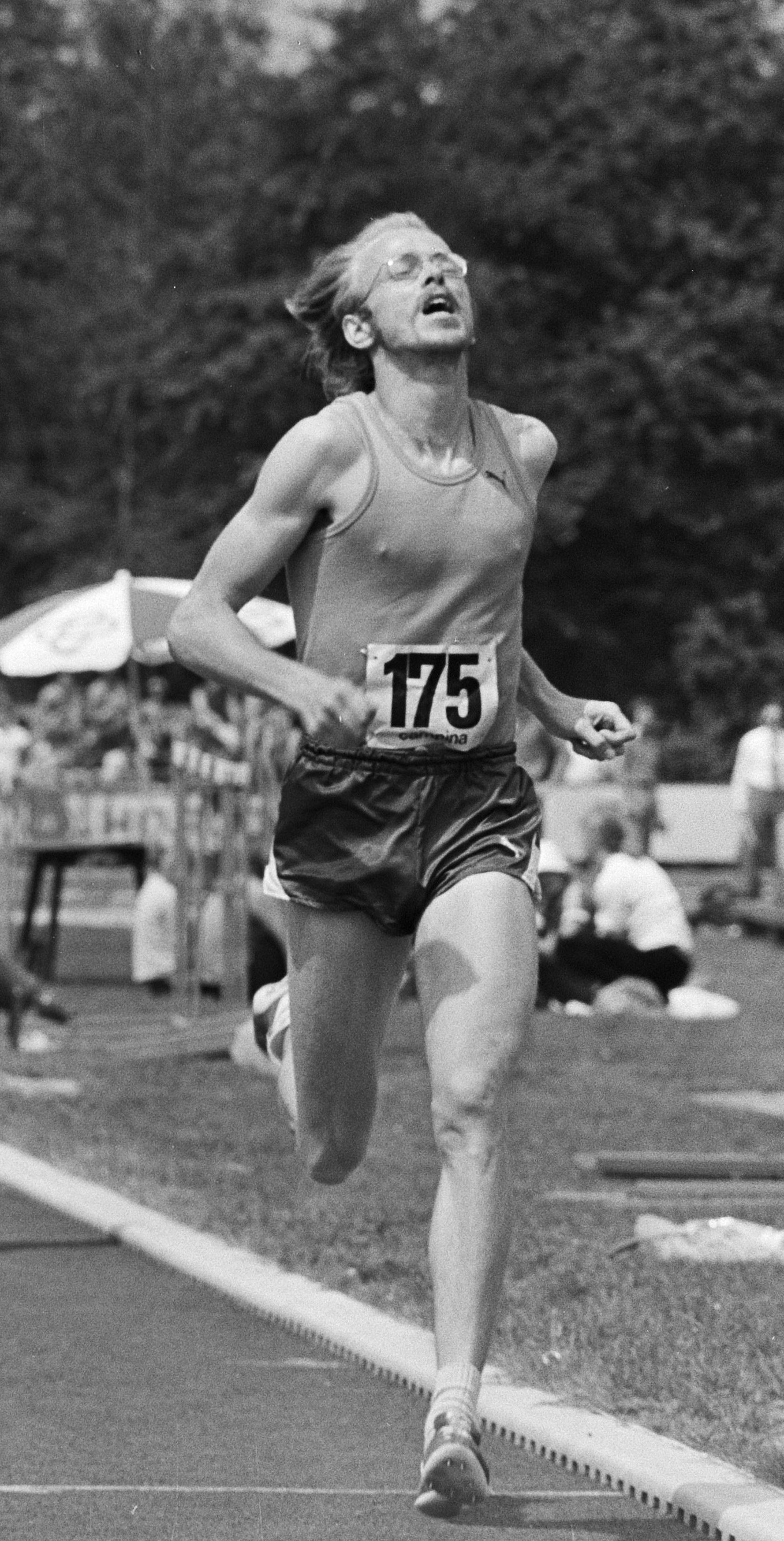 Nederlandse atletiekkampioenschappen in Sittard; Evert Hoving wint 800 meter, achter hem Eric van Amstel (2e) en Gijsbers (l).